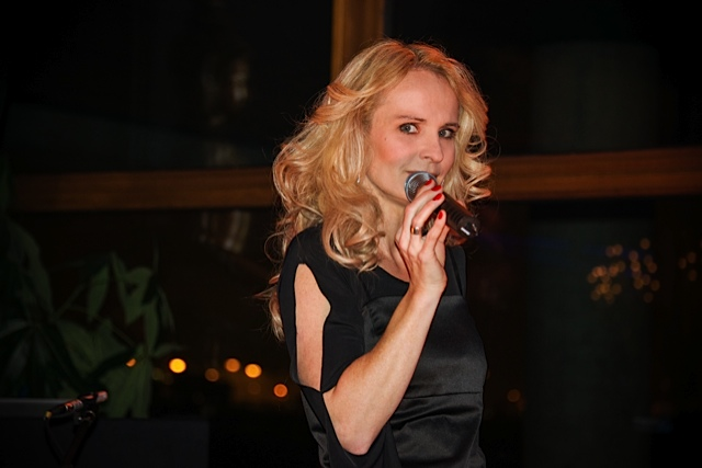 Julia Hillens, Gründerin und Geschäftsführerin von Blue Café the Band